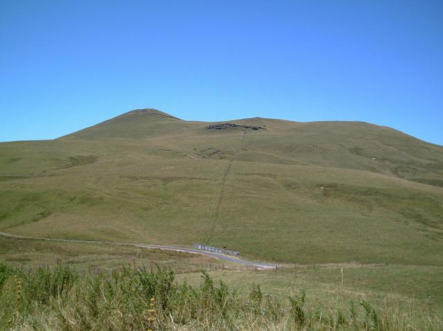 Chamaroux